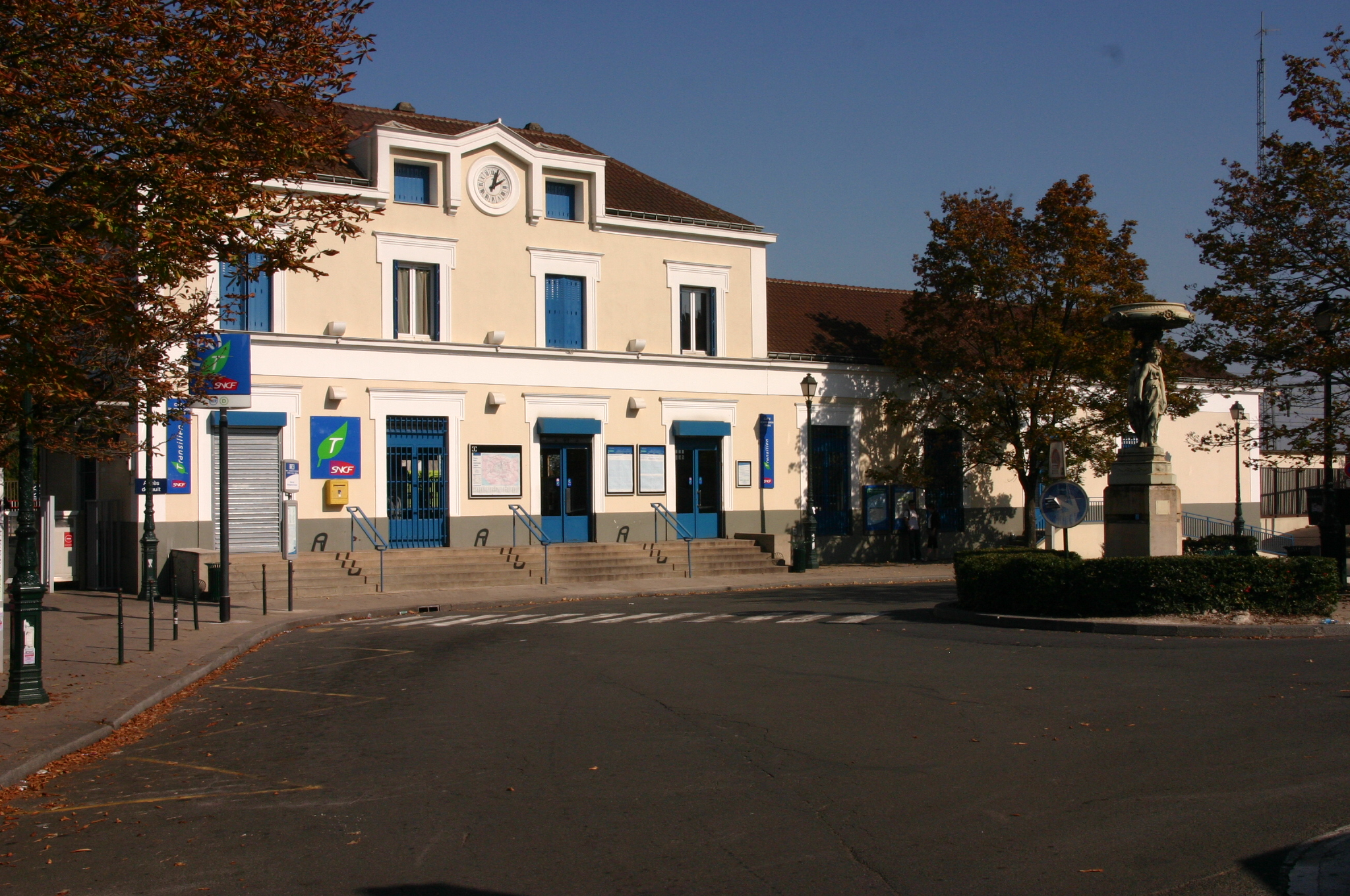 La Gare de Montgeron-Crone, Montgeron (Essonne, Île-de-France, France).